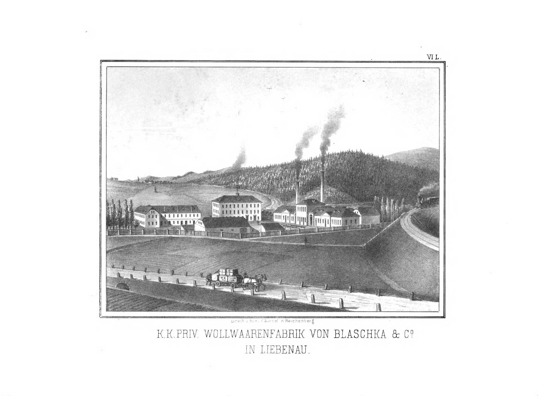 Anschiringer, Anton. Album der Industrie des Reichenberger Handelskammer-Bezirks I. Reichenberg, Jannasch, 1858. Pohled na Továrnu na vlněné zboží Blaschka a spol. "K. K. priv. Wollwaarenfabrik von Blaschka und Co. in Liebenau".